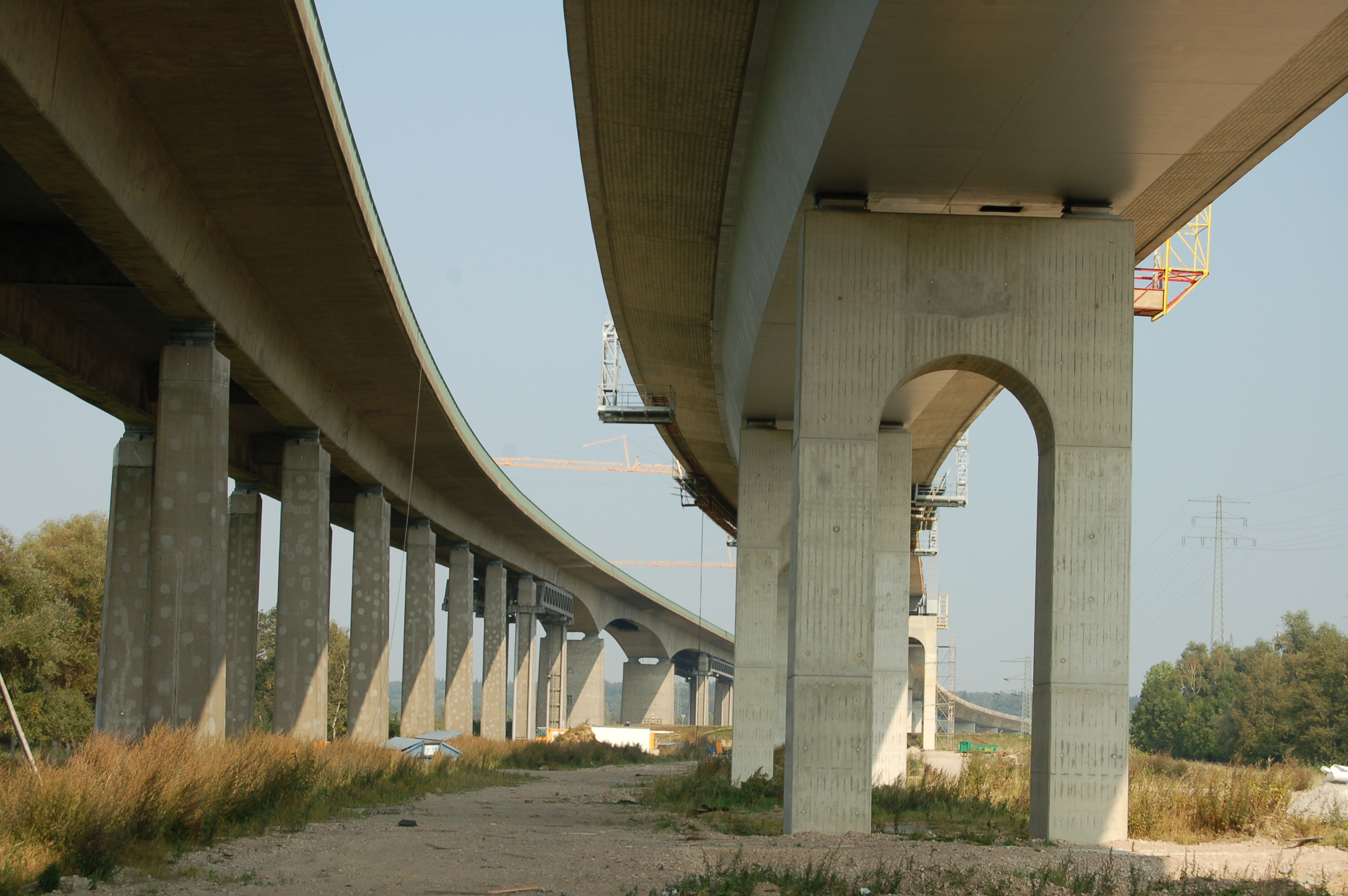 Die zwei Störbrücken im Verlauf der A23 am 20.09.2009, links die alte und rechts die neue Brücke.